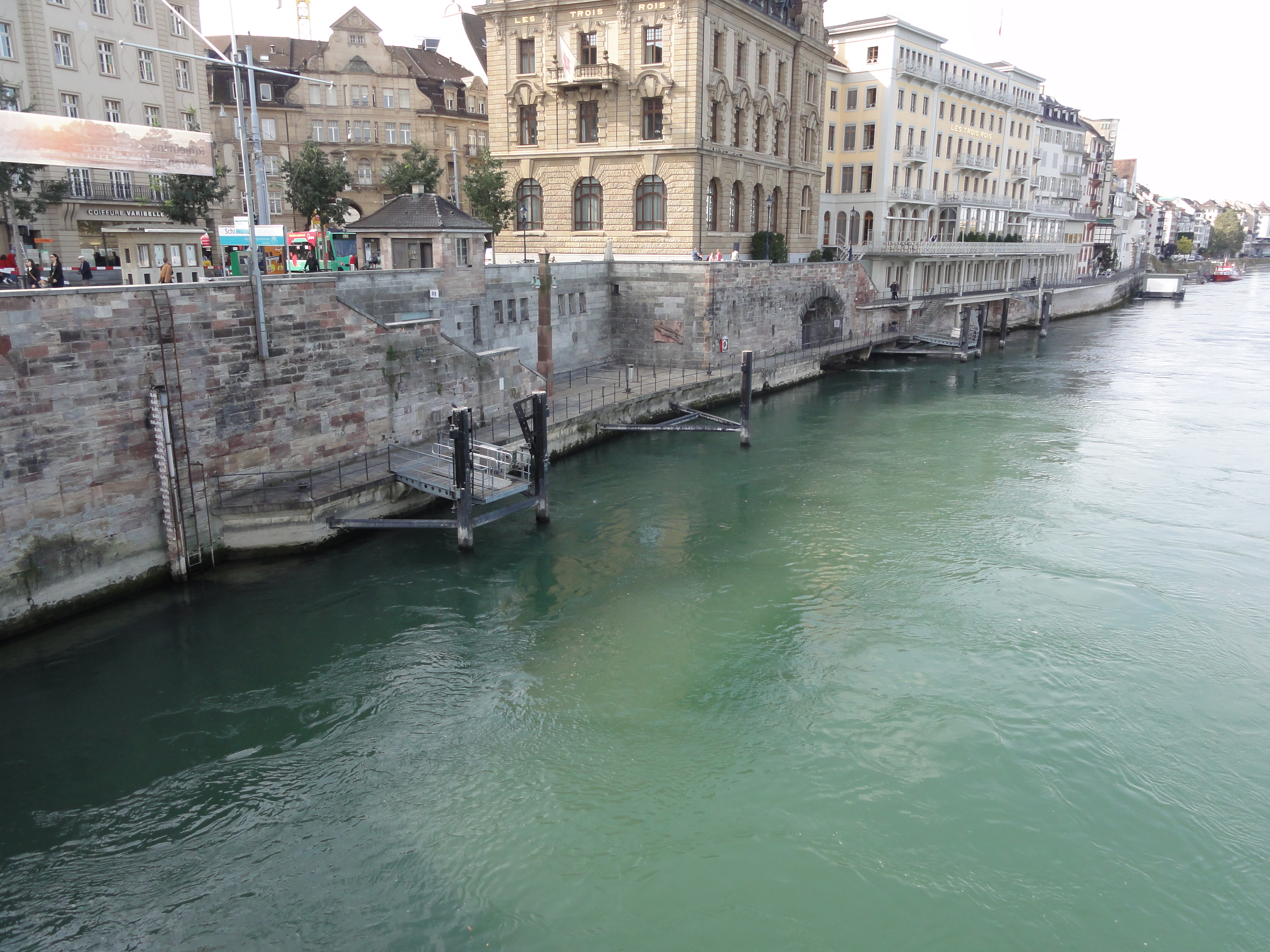 Basel – Schifflände (Mittlere Brücke)